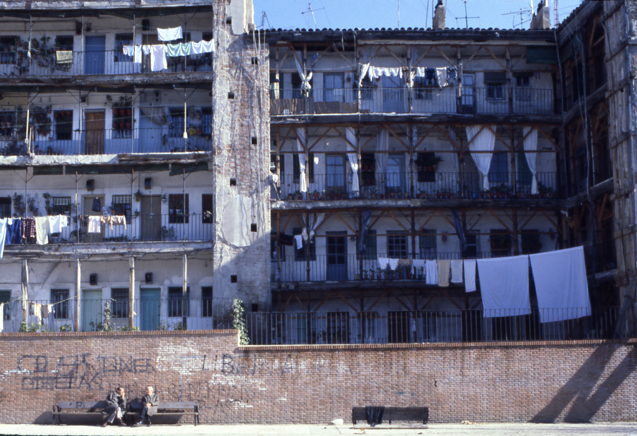 Servizio fotografico : Madrid, 1980 / Paolo Monti. - Foglio: 1, Fotogrammi complessivi: 20/20 : Diapositiva, sviluppo cromogeno/ pellicola ; 35 mm. - ((Iscrizione manoscritta su una striscia di cartoncino bianco: "Spagna/ Madrid" all'interno del contenitore. - Fonte: Rubrica di Paolo Monti: Diapositive 24x36mm (1948-1982), presso Archivio Paolo Monti. Rubrica con elenco soggetti e numeri di inventario (da 1 a 1000) corrispondenti ai fogli a tasche in pvc in cui sono contenute le diapositive.